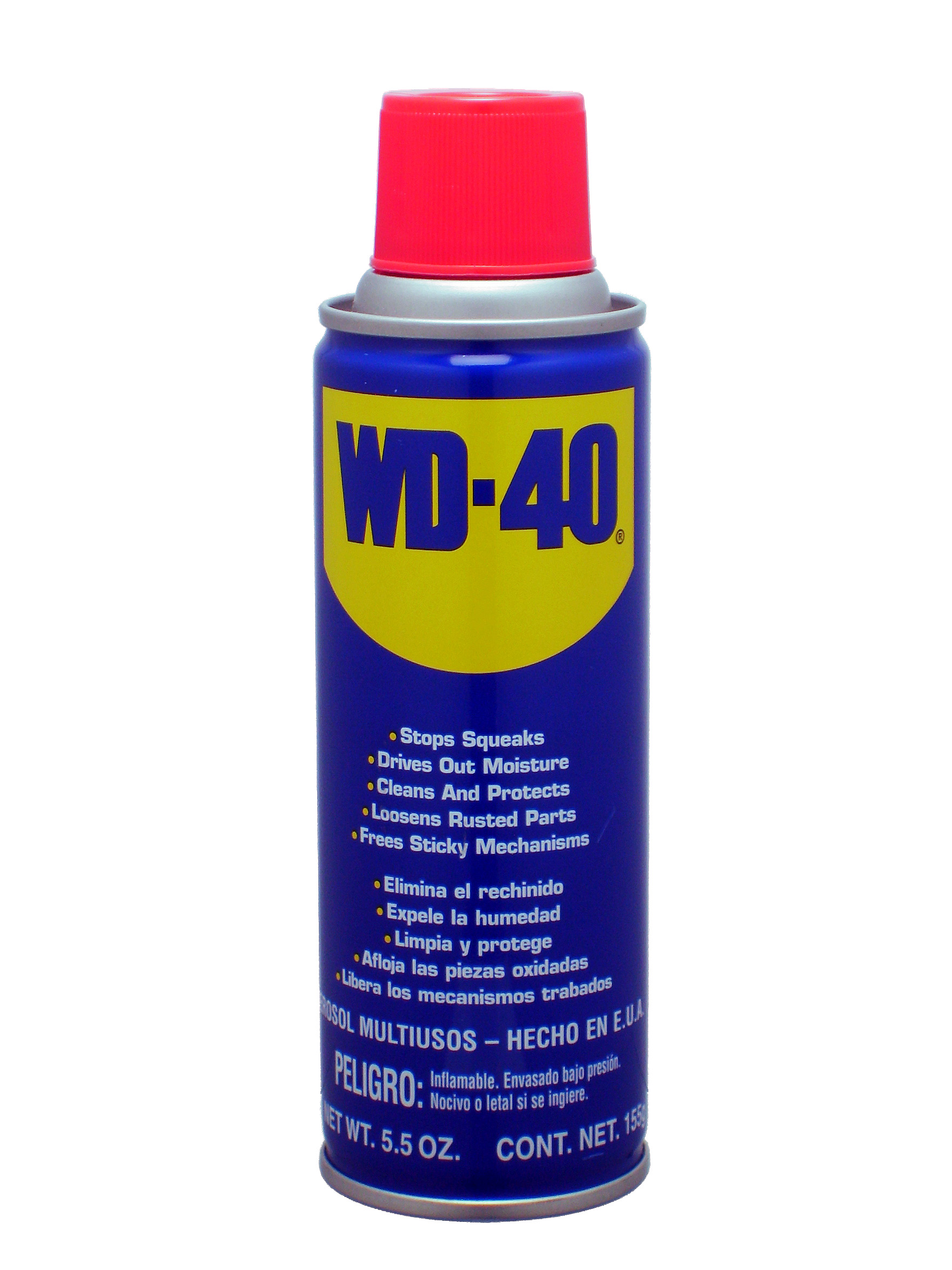 Envase de lubricante WD-40 de 155g.